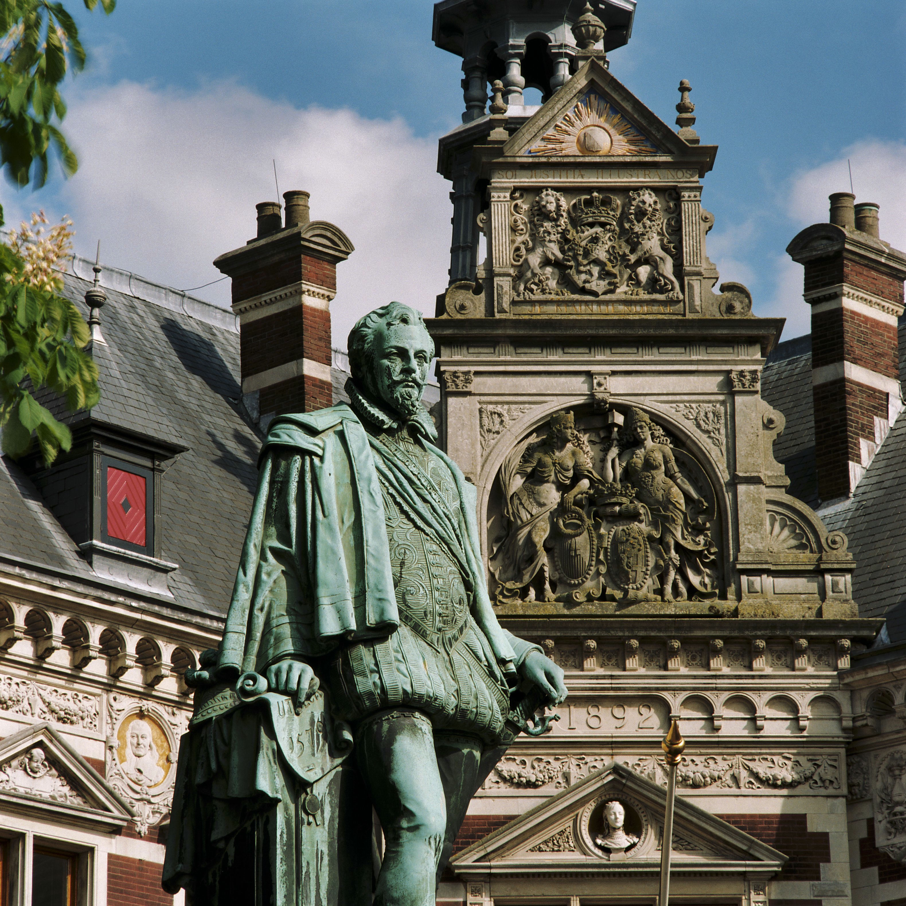 Standbeeld Van Jan Van Nassau: Voorzijde standbeeld, close-up (opmerking: Gemaakt voor boek Monumenten voor Oranje en Nassau)